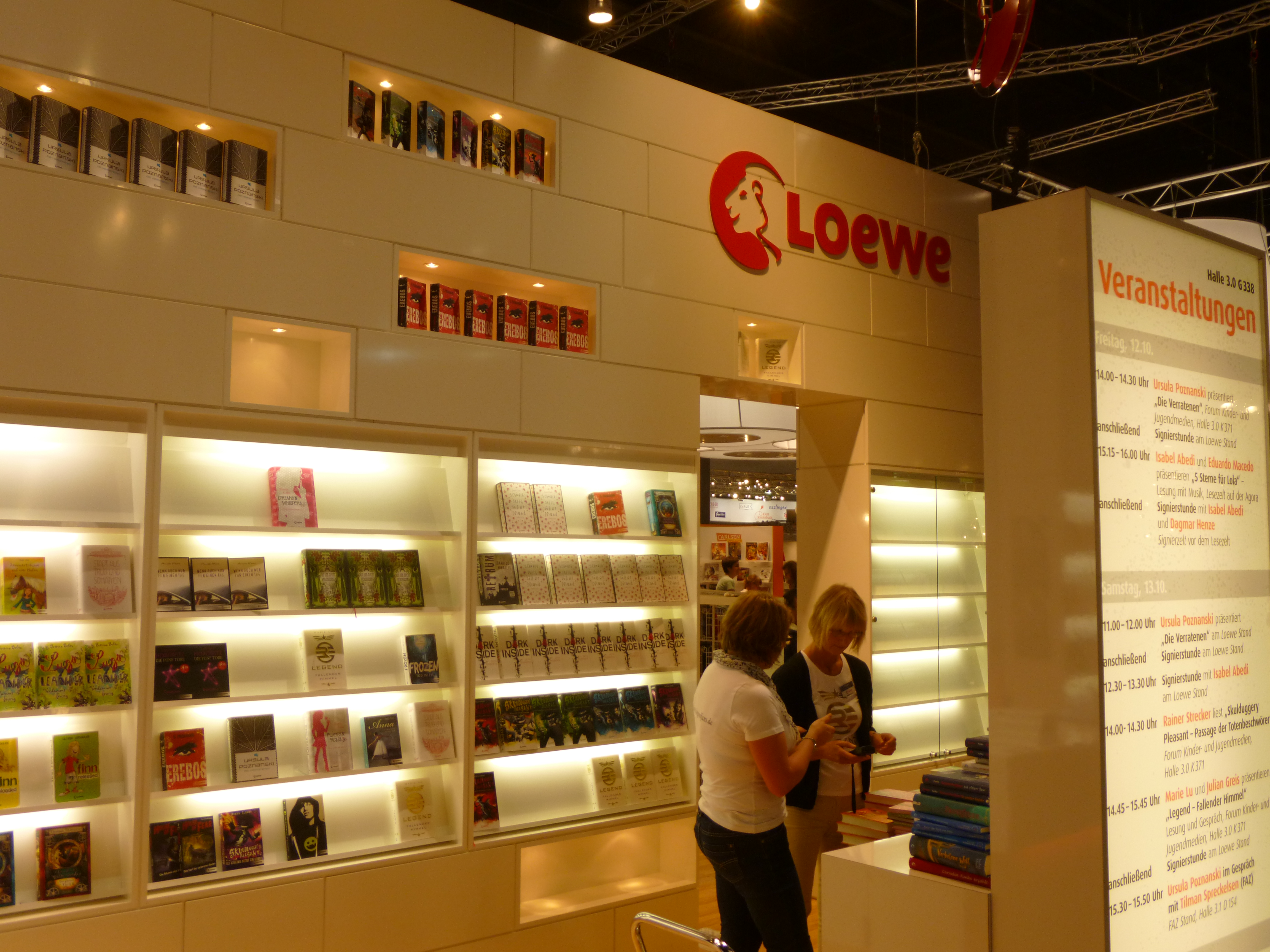 stando de la eldonejo Loewe en la Frankfurta librofoiro 2012